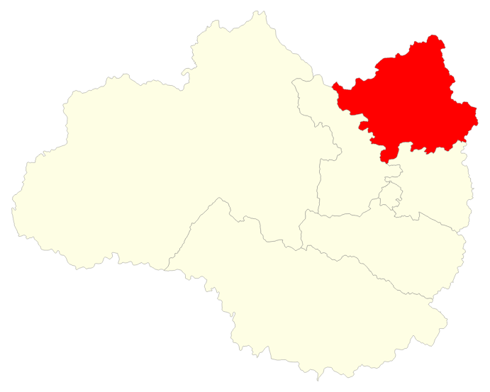 Localisation du district d'Ambohimahasoa dans la région Matsiatra Ambony